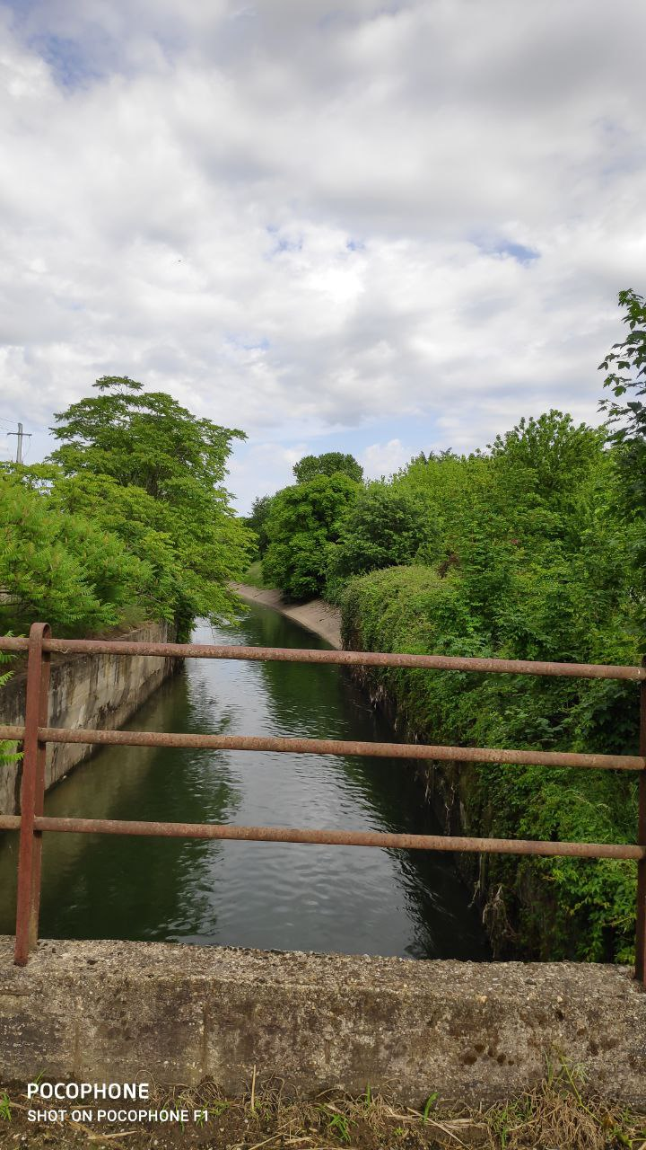 Canale scolmatore del Redefossi a San Donato Milanese